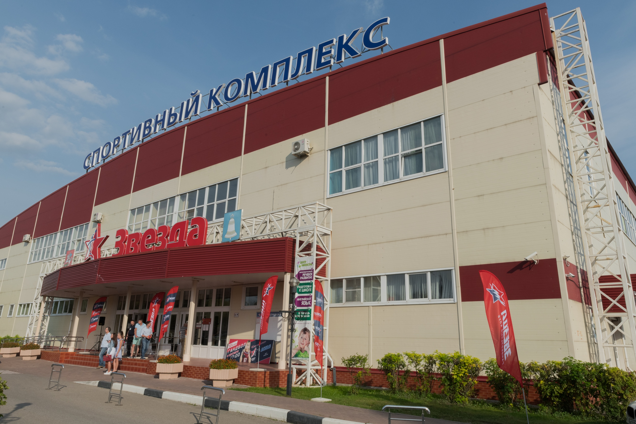 Домашняя арена ГК "Звезда". Вместимость 1000 человек.